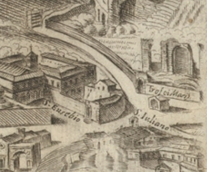 Pianta di Tempesta